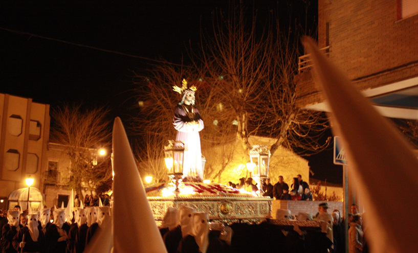 Procesión de Jesús de Medinaceli en Santa Olalla